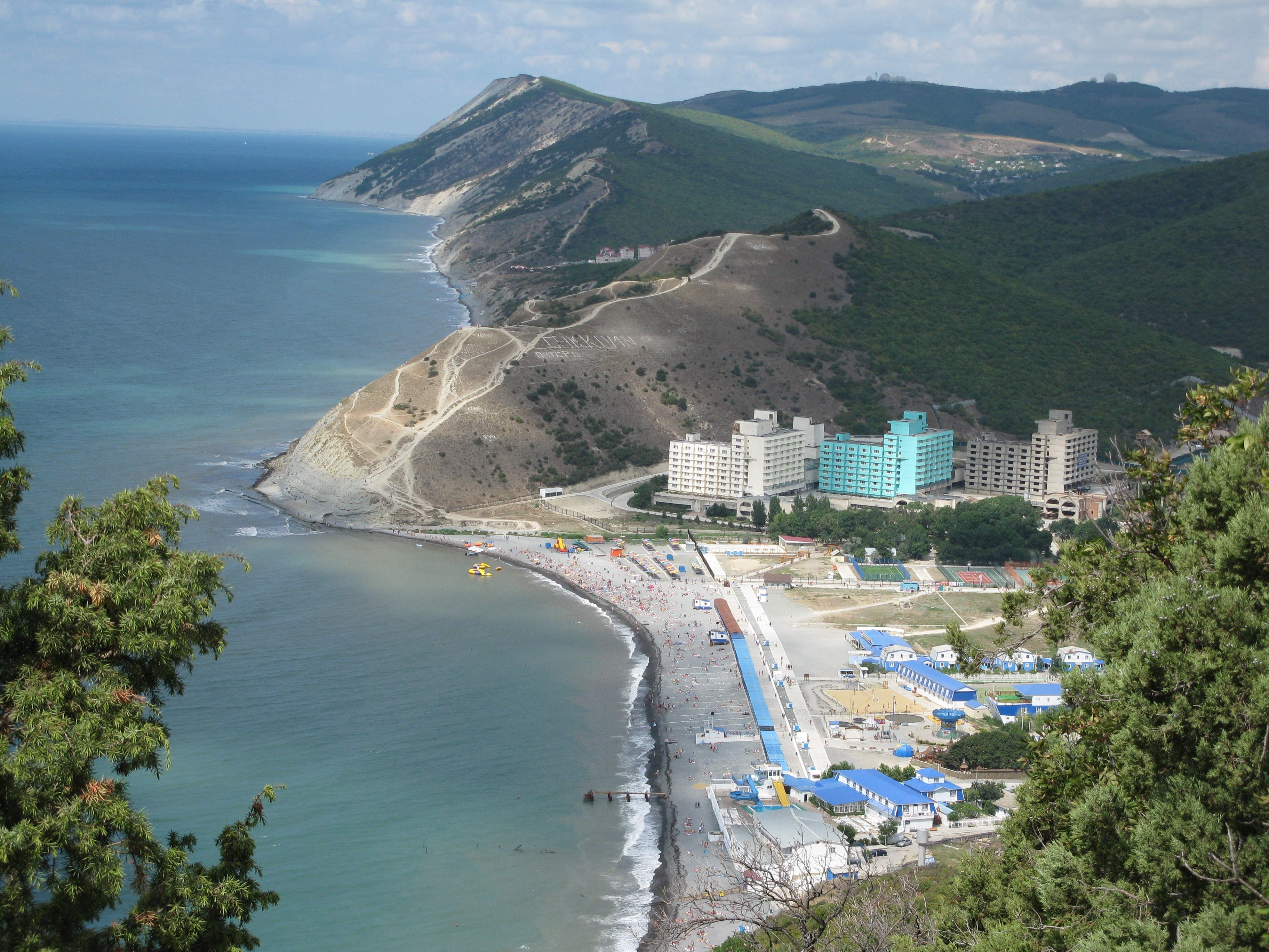 Anapsky District, Krasnodar Krai, Russia